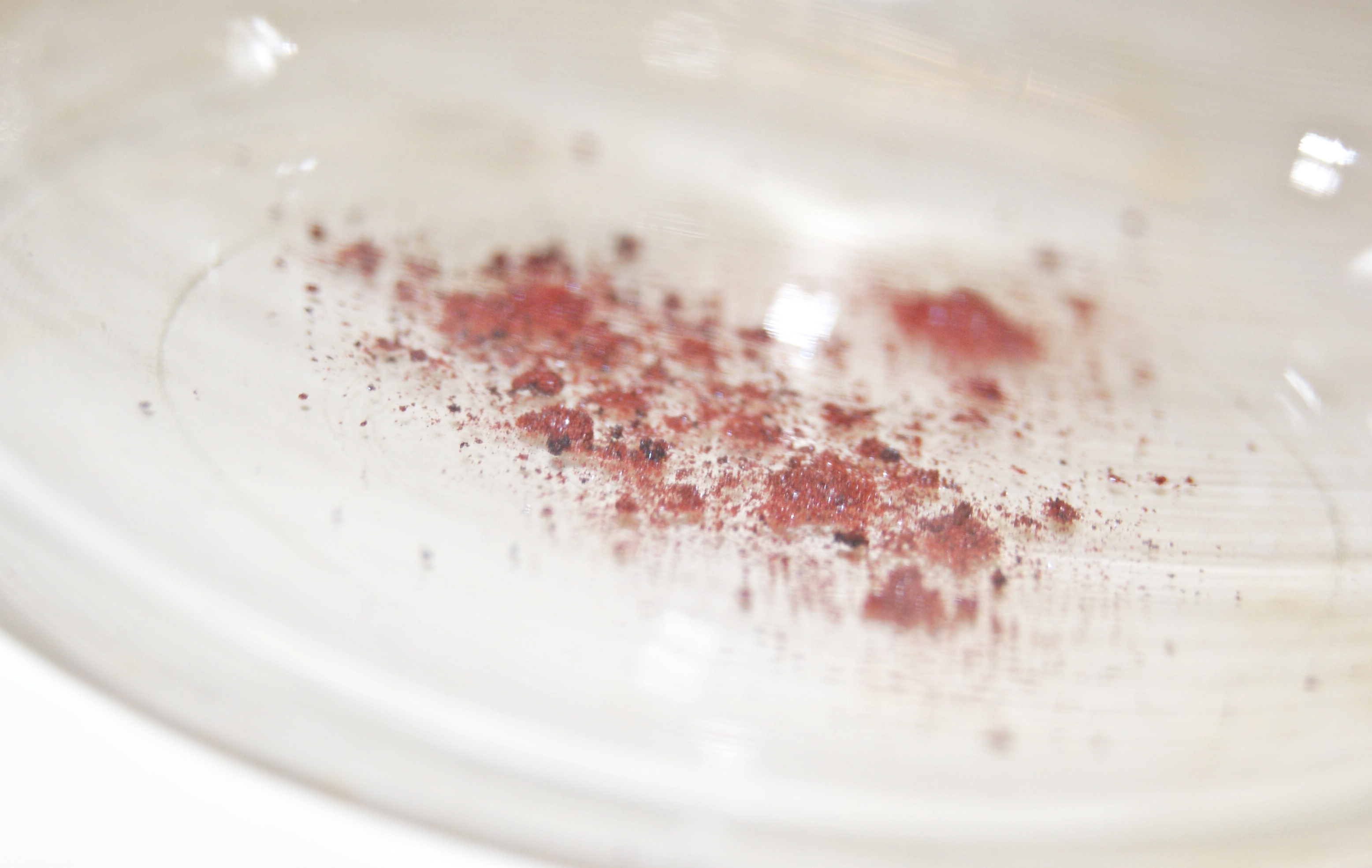 Methylrot-Natrium, Reagenz nach Ph. Eur.